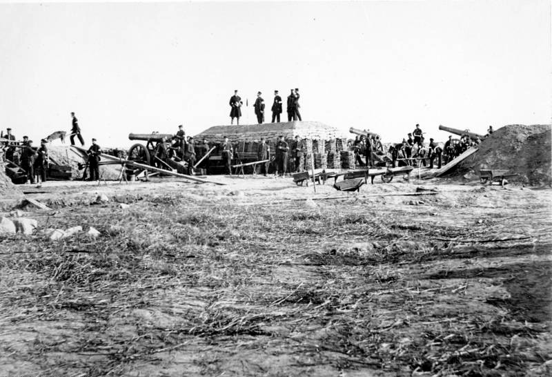 Düppeler Schanzen. Nach dem Sturm der preussischen Truppen am 18. April 1864. Lünette B, jetzt Strandbatterie, besetzt mit 5 gezogenen 24pfündern.